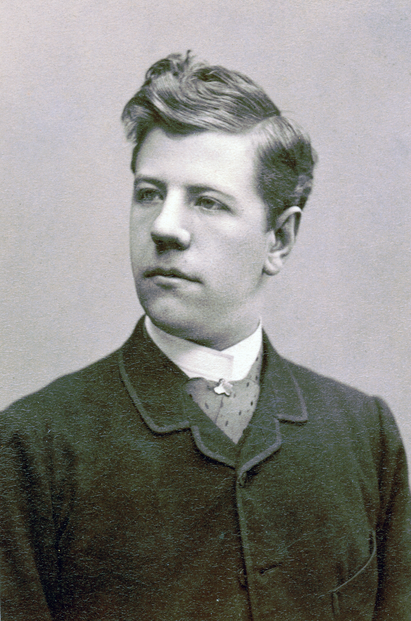 Richard Lundin, skådespelare vid Vasateatern 1889